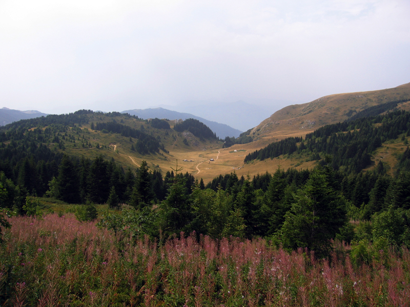 Biogradska gora